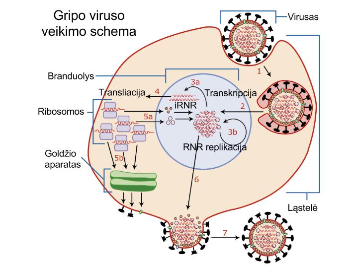 Viruso invazija ir dauginimasis ląstelėje šeimininkėje